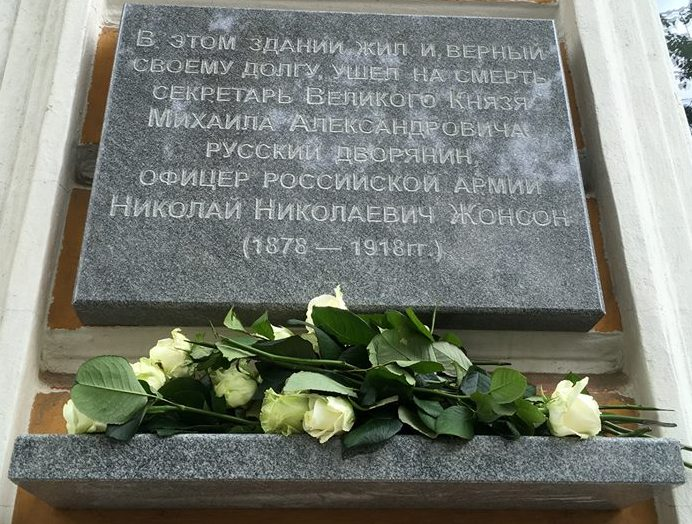 Мемориальная доска Н.Н.Жонсону на стене гостиницы "Королёвские номера" в Перми. Фото с открытия 11 июня 2018 года